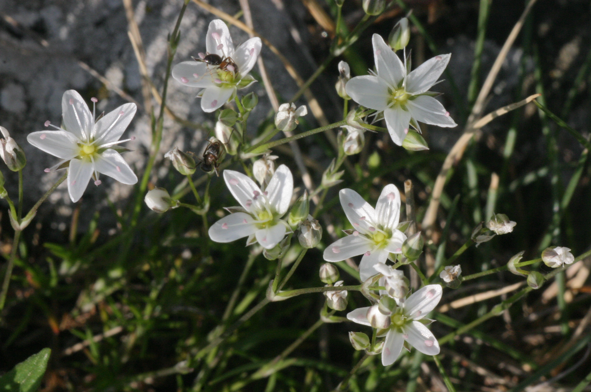 Minuartia glaucina (Hügel-Miere) Aufnahmeort: Ruster Höhenzug, Burgenland, Austria